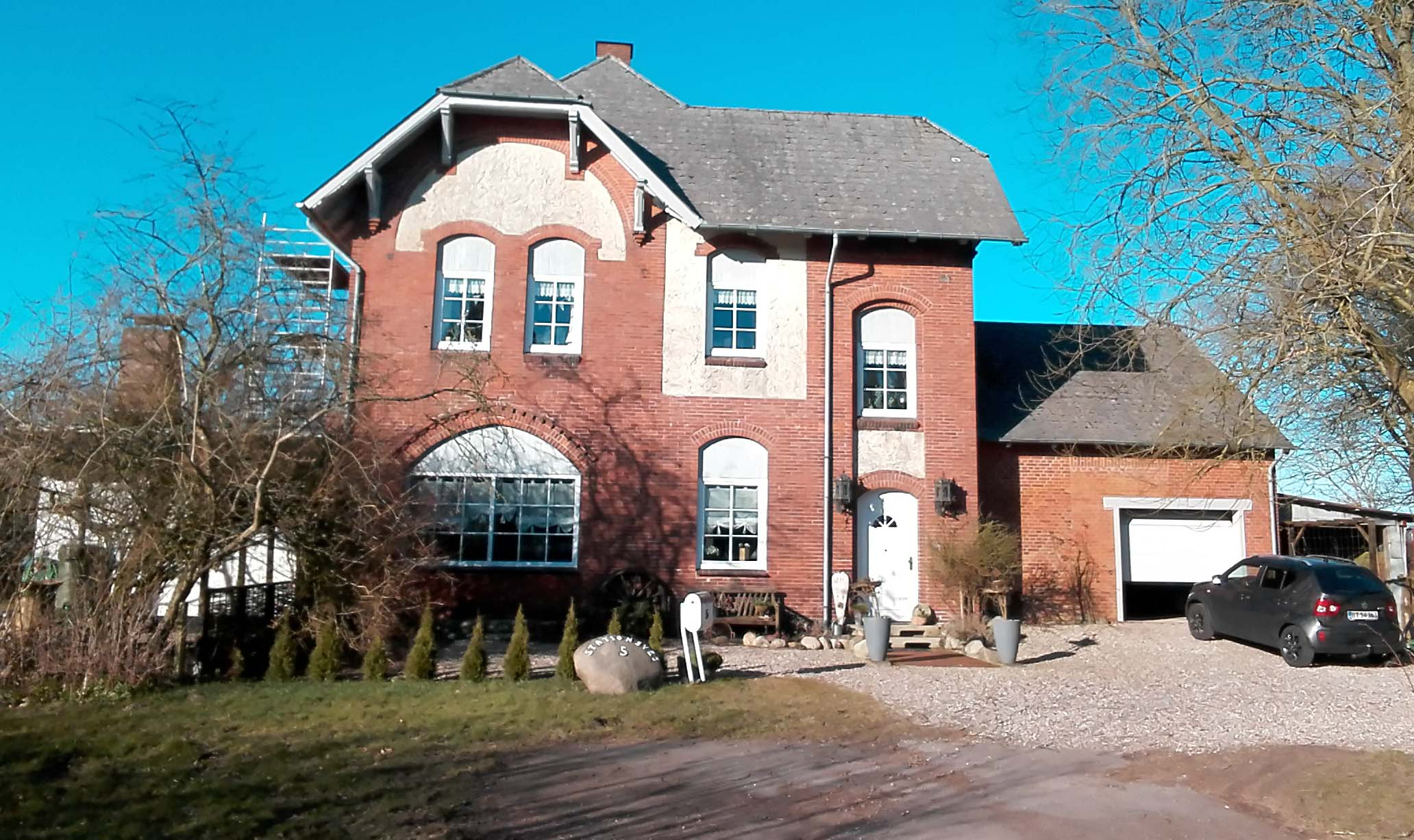 Lundtoft Station